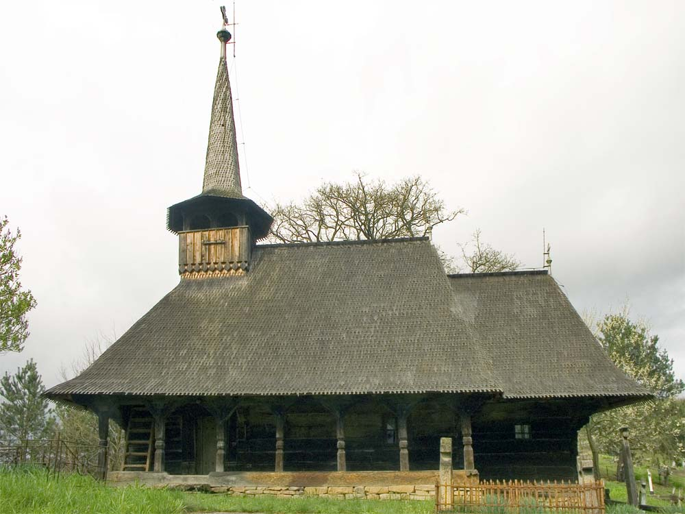 Biserica de lemn din Borza, faţada de sud.